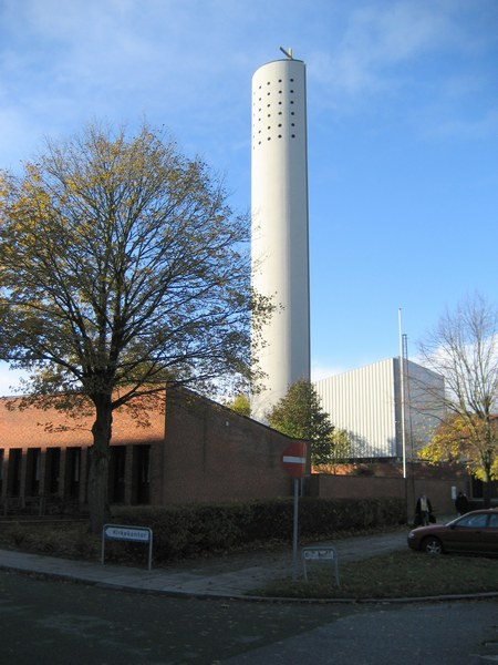 Langenæskirken november 2006